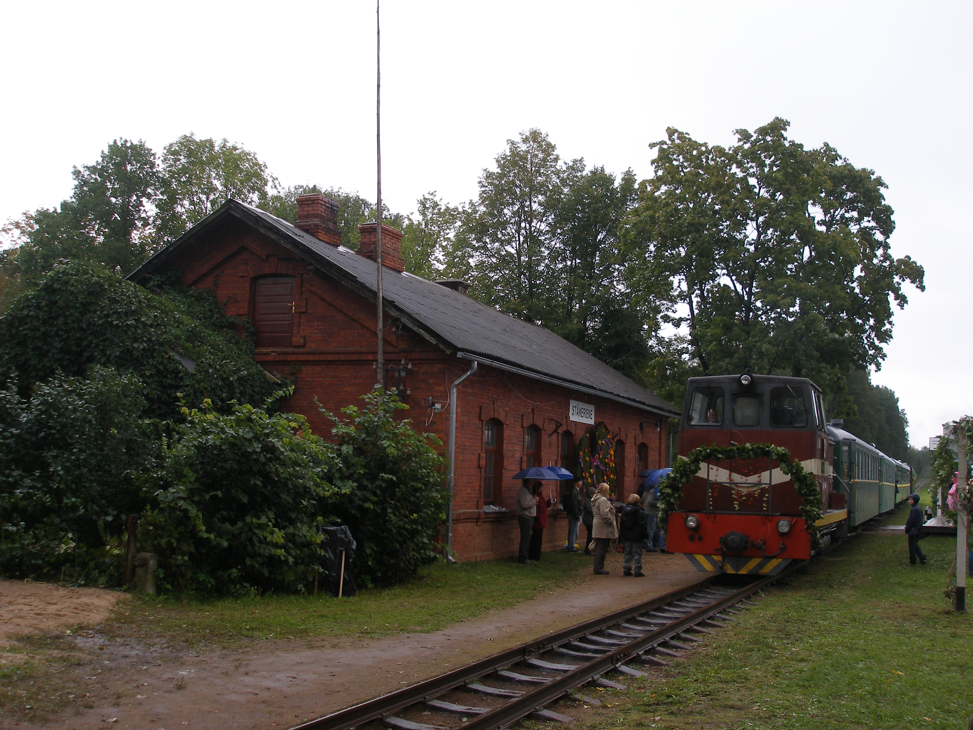 Pasažieru vilciens pienāk Stāmerienes stacijā